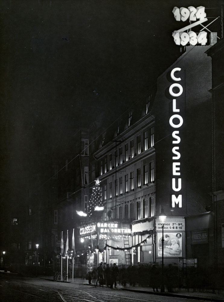 Colosseum-biografen 1934